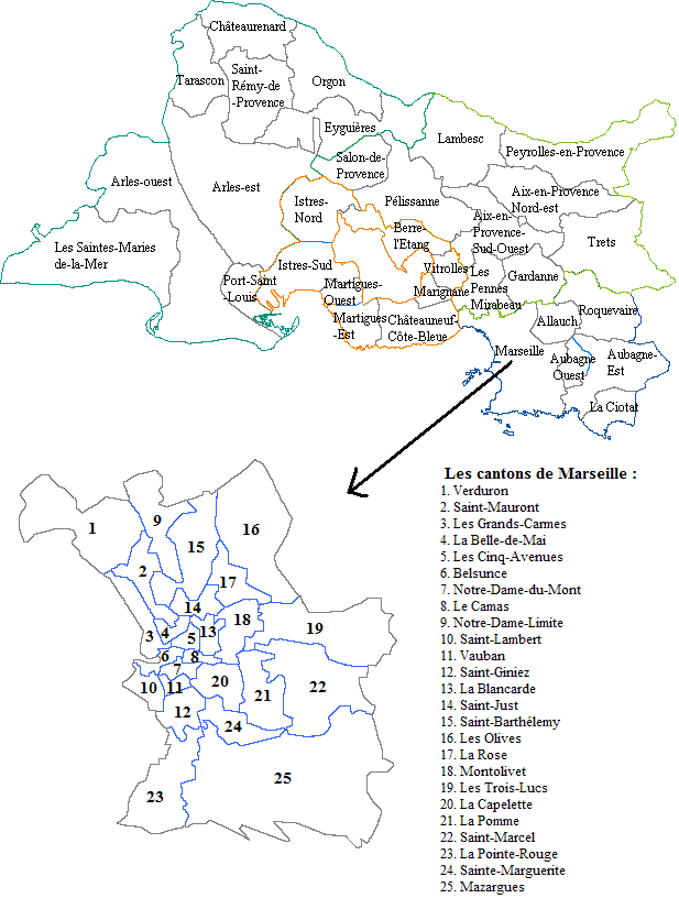 Les cantons des Bouches du Rhône (France)